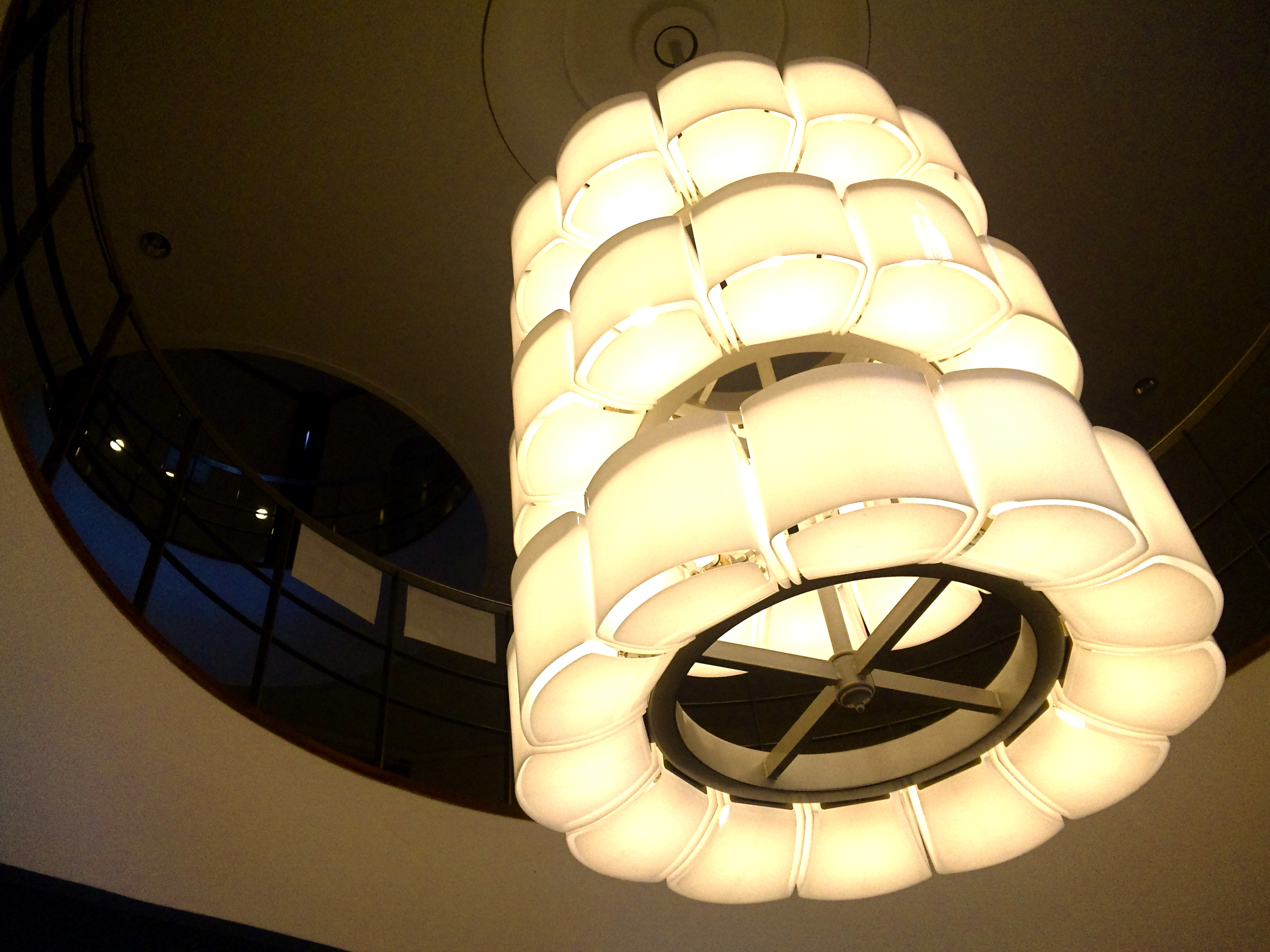 Un hall de lustre de Hall Commémoratif Saionji, qui a été utilisé pour le département de relations internationales à l'Université Ritsumeikan. Ce bâtiment est dans Kyoto, le Japon.